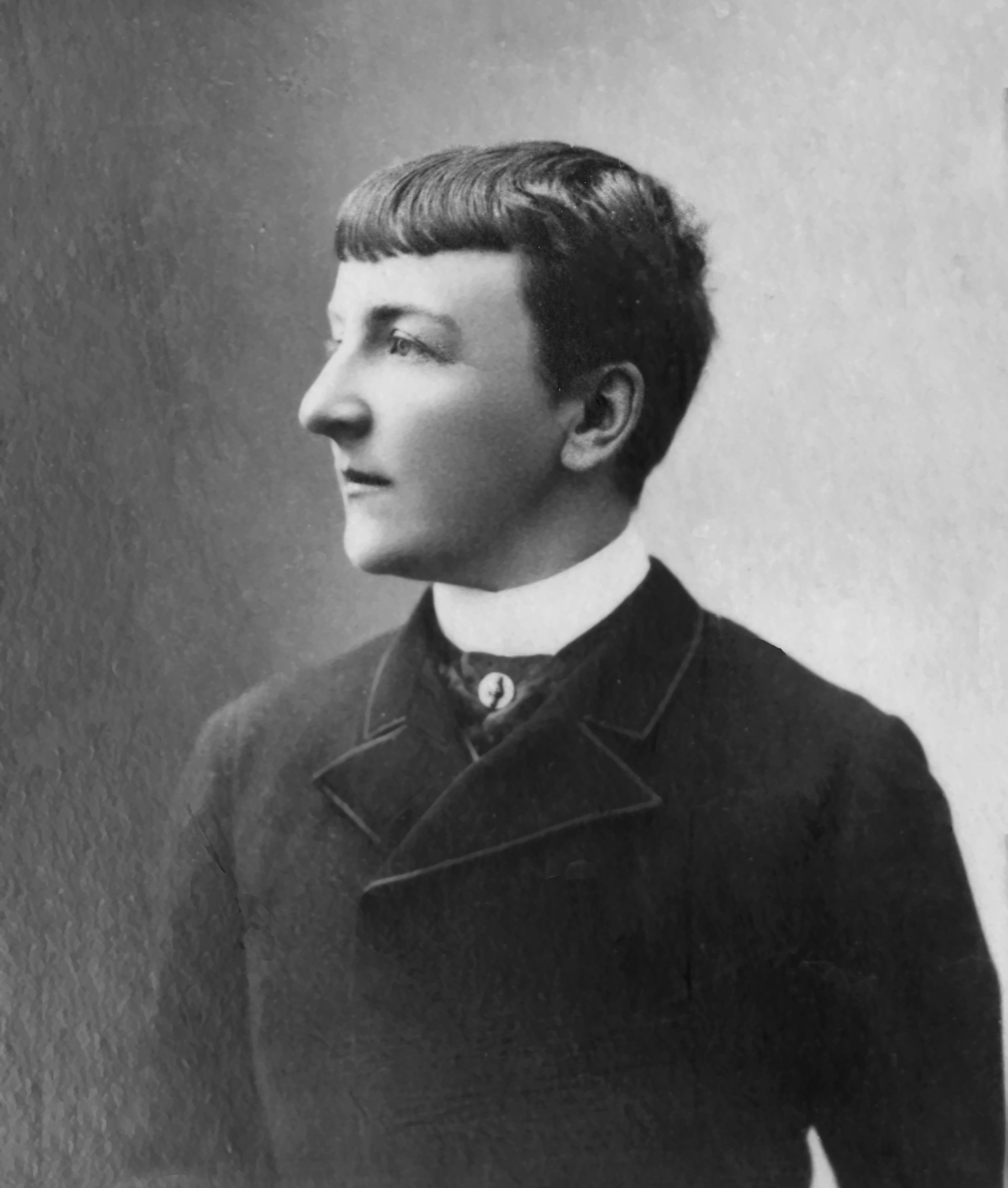 Jane Dieulafoy (Jane Henriette Magre) (1851-1916), archéologue, auteur de romans, de nouvelles, de théâtre, journaliste, photographe, épouse de Marcel Dieulafoy